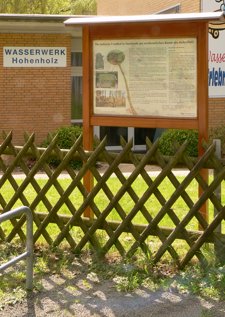 Infotafel am Wasserwerk Hohenholz zum Jüdischen Friedhof Steinhude